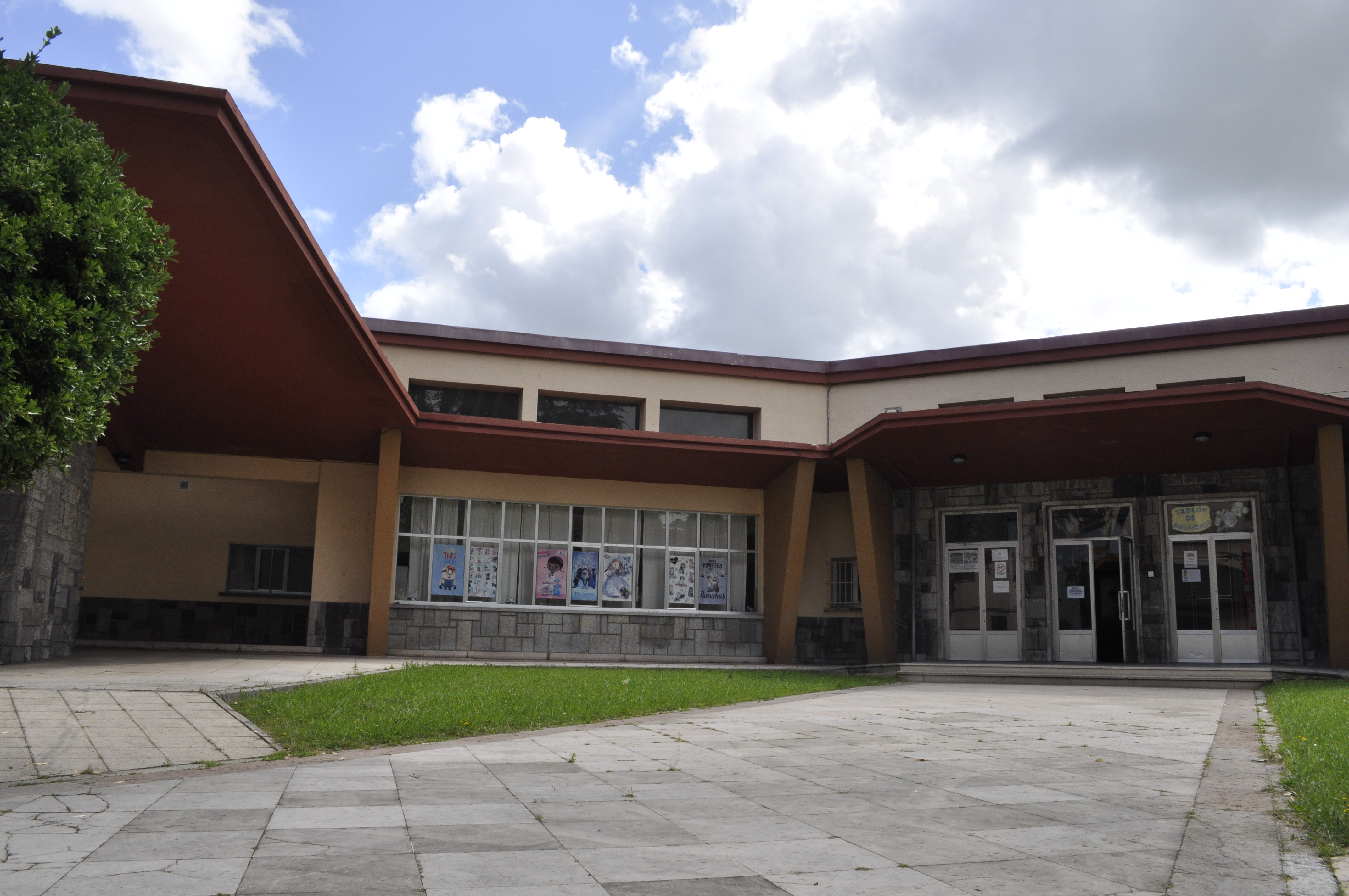 Colegiofemenino